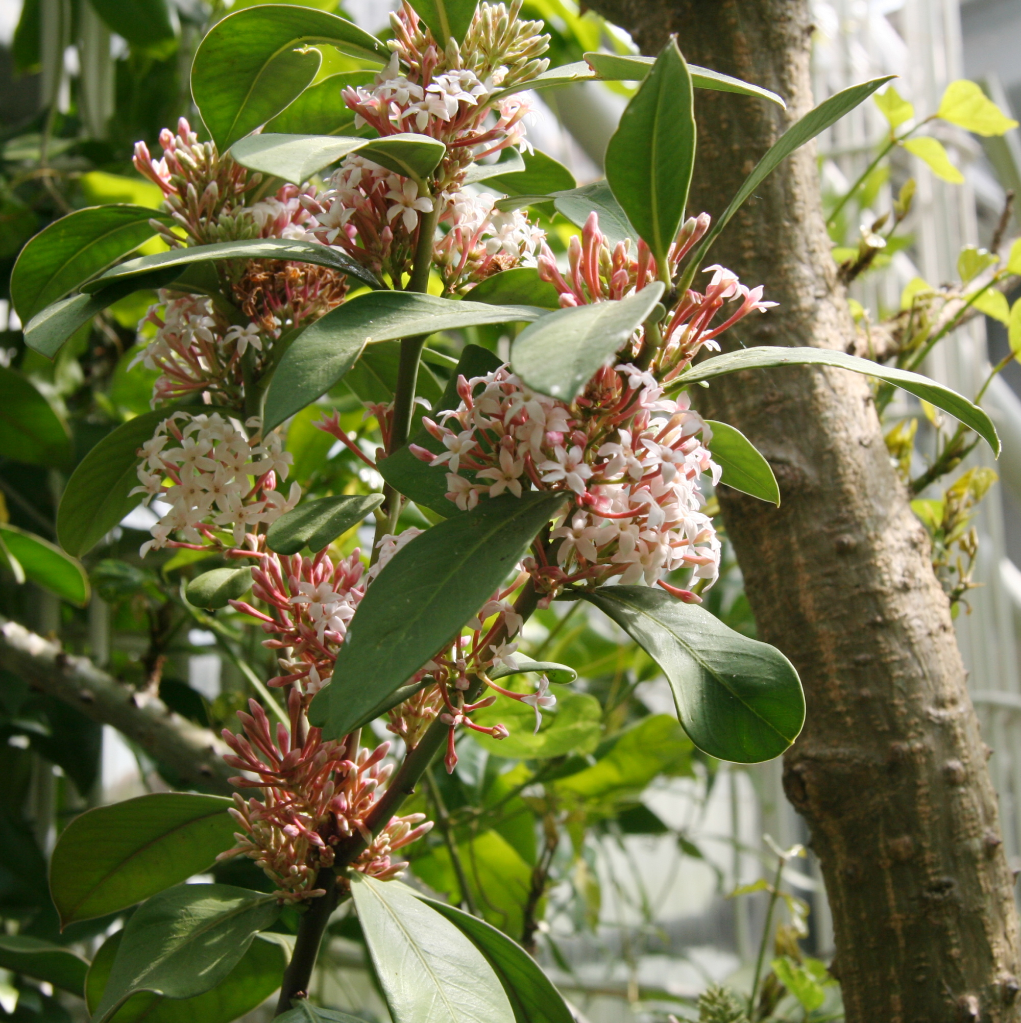 Acokanthera oblongifolia im Botanischen Garten Dresden